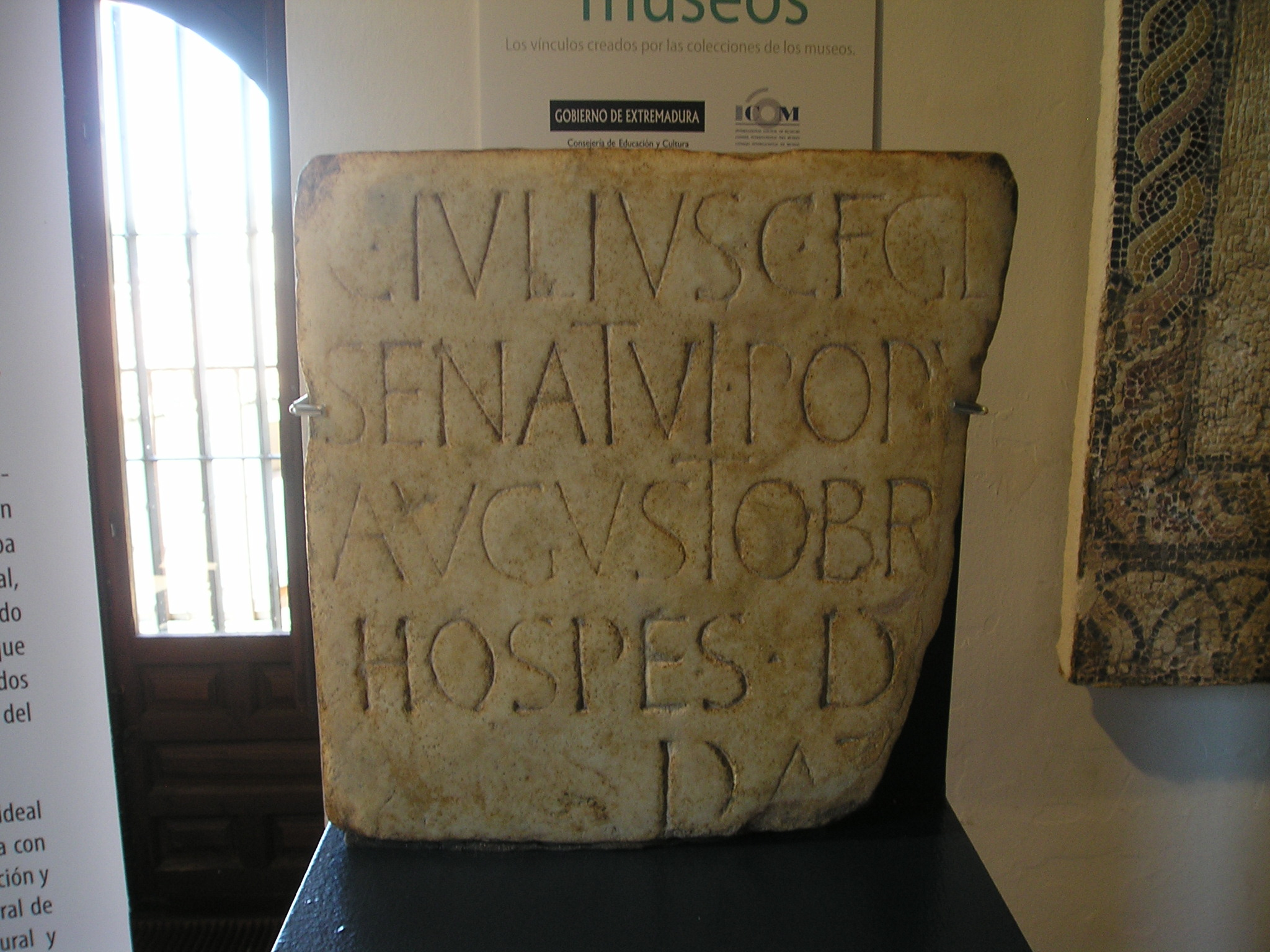 Inscripción honoraria romana procedente de Talavera la Vieja (Cáceres, España), depositada en el Museo de Cáceres, correspondiente con CIL II 5346: C(aius) Iulius C(ai) f(ilius) Gl[aber] / senatui popu[loque] / Augustobr[igensi] / hospes d[onum] /datum